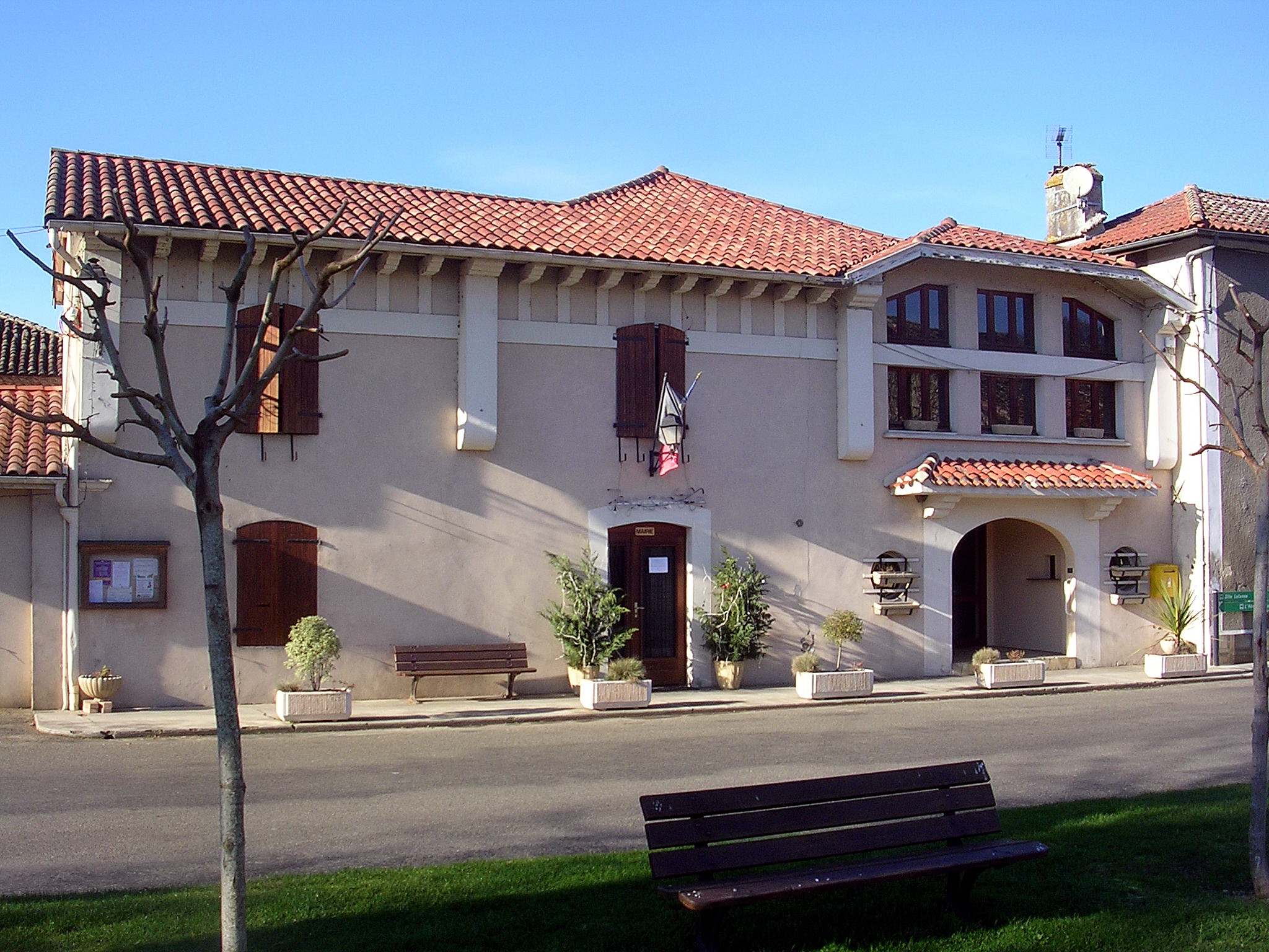 Mairie de Duhort-Bachen (Landes, France)